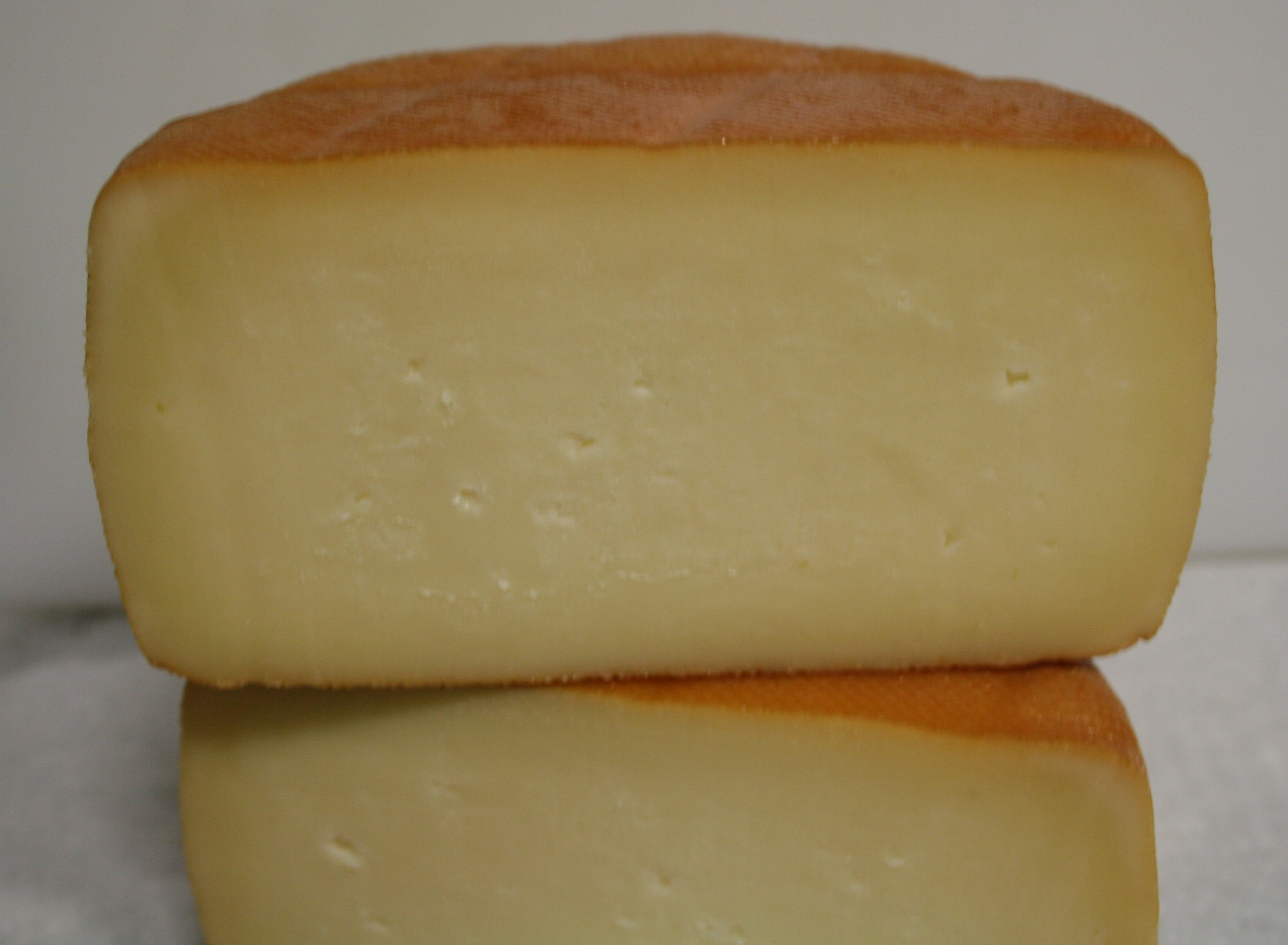 Queso ahumado de Pría, corte para ver la pasta.